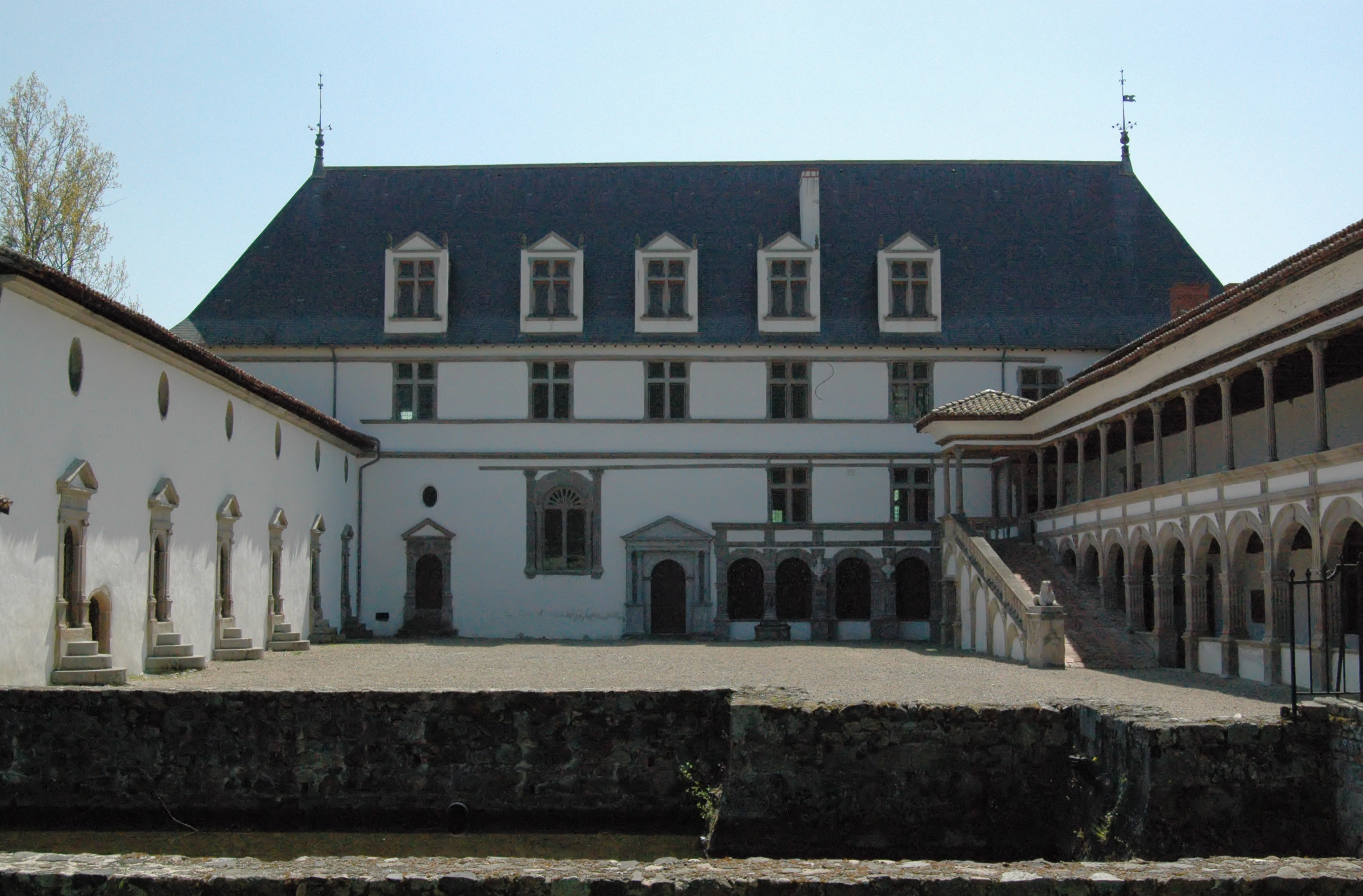 Château de la Bastie d'Urfé, Saint-Etienne-le-Molard, France